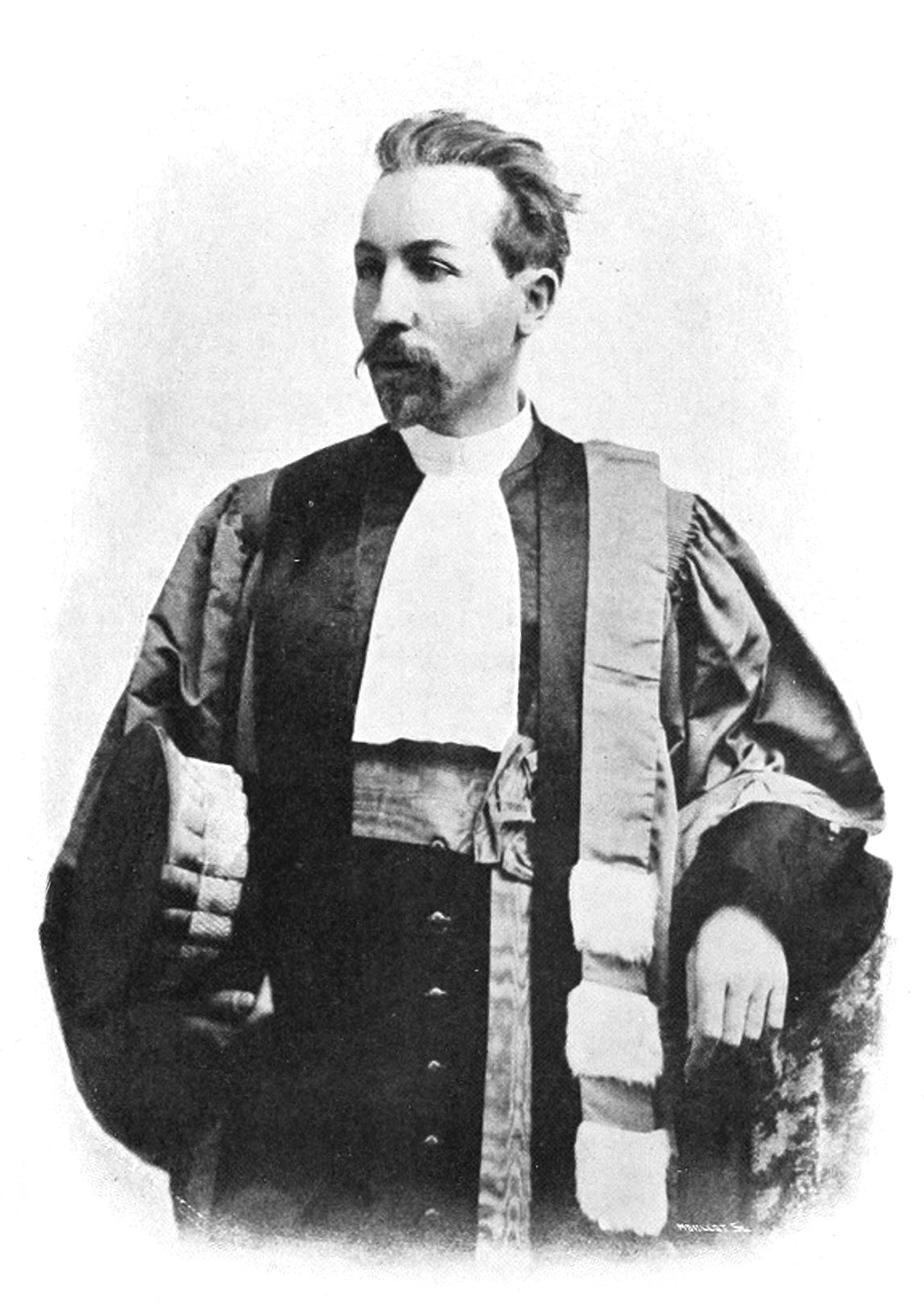 Paul Gourret, French zoologist